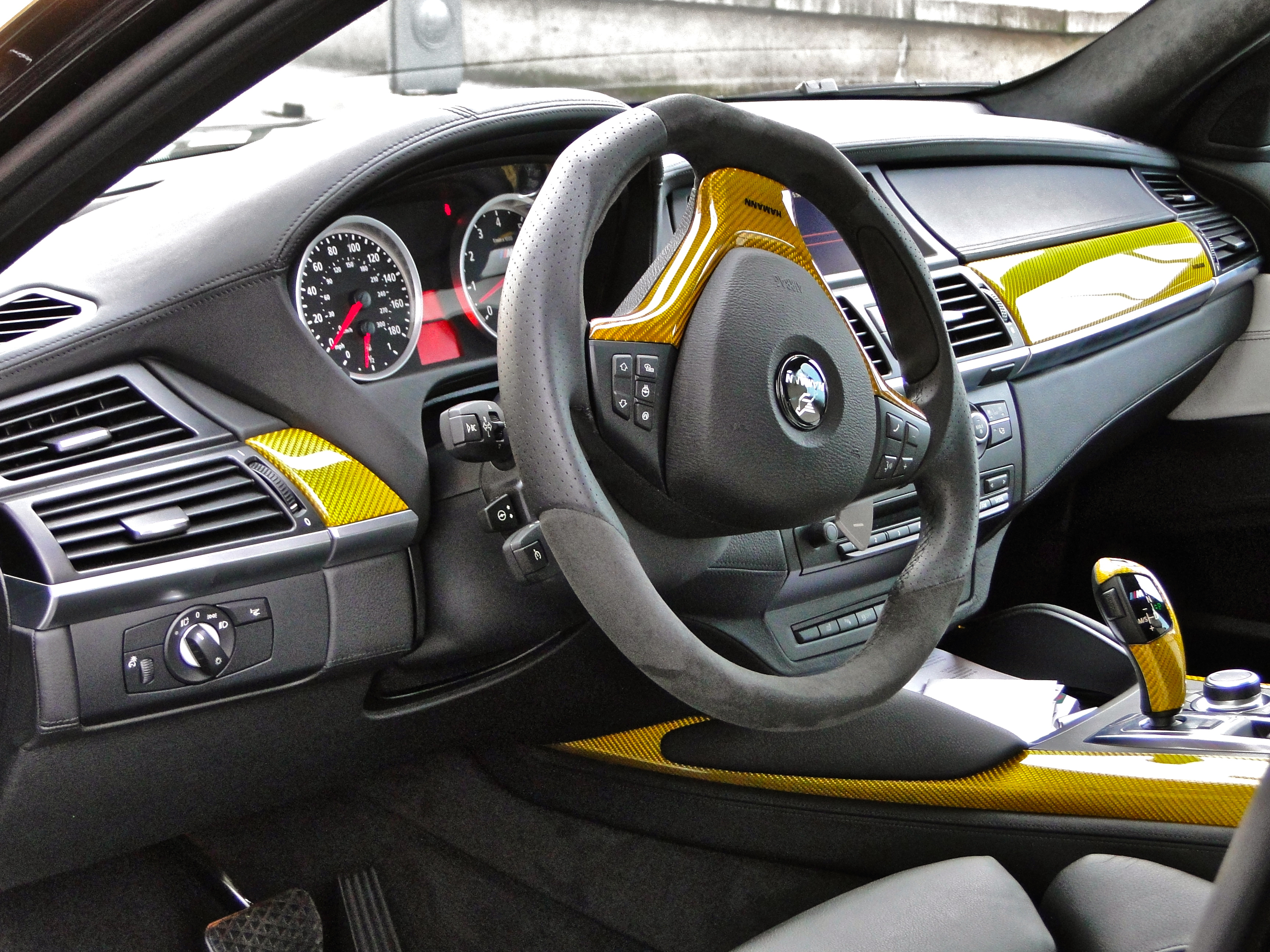 Caractéristiques Constructeur : BMW Préparateur : Hamann Années de production : 2010 - Prix : ±275 000 € Moteur et transmission Moteur : V8 Cylindrée : 6 192 cm3 Puissance maximale : 670 ch Poids et performances Poids : 1 985 kg Vitesse maximale : 300 km/h Accélération : 0 à 100 km/h en 4,2 s